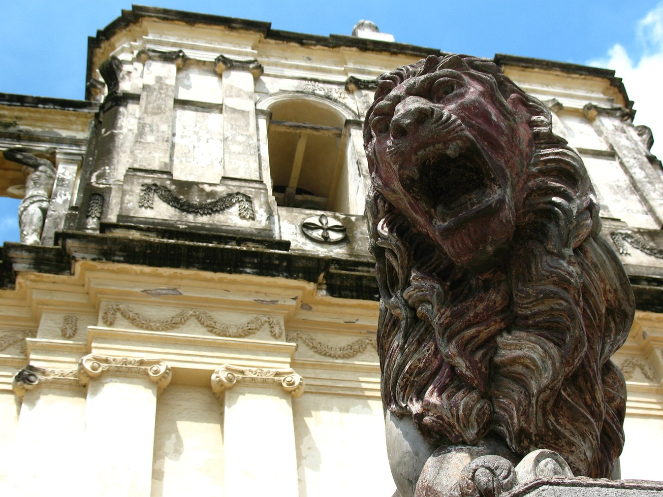 Escultura de un León a las puertas de la Catedral de León